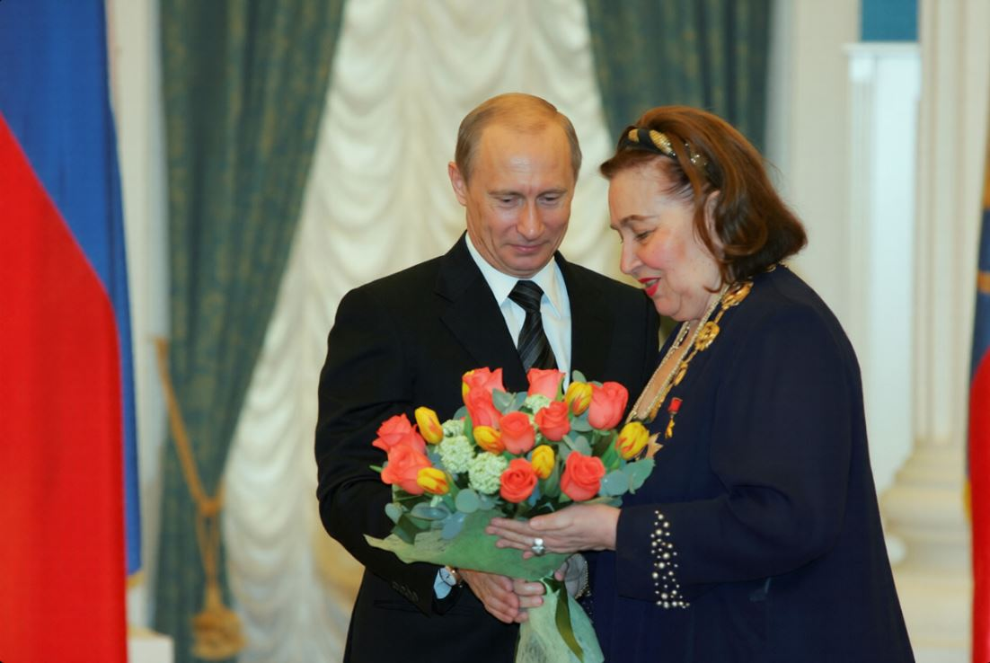 Орденом Святого Апостола Андрея Первозванного награждена оперная певица Ирина Архипова.